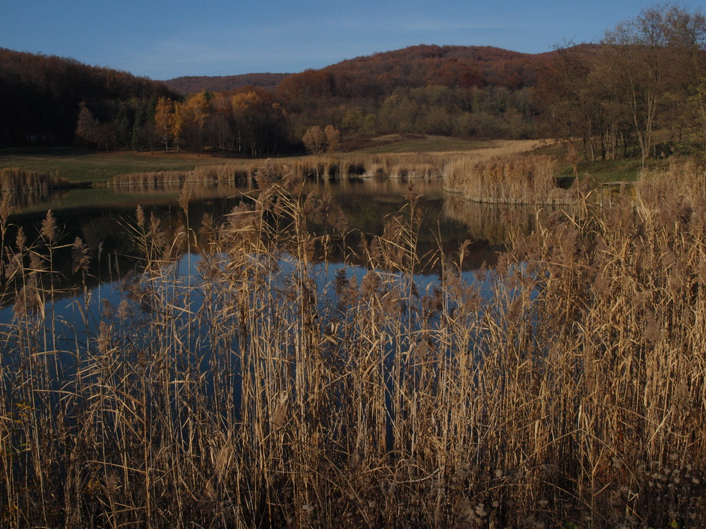 Ljeskove vode u općini Bukovlje, kraj Slavonskog Broda.